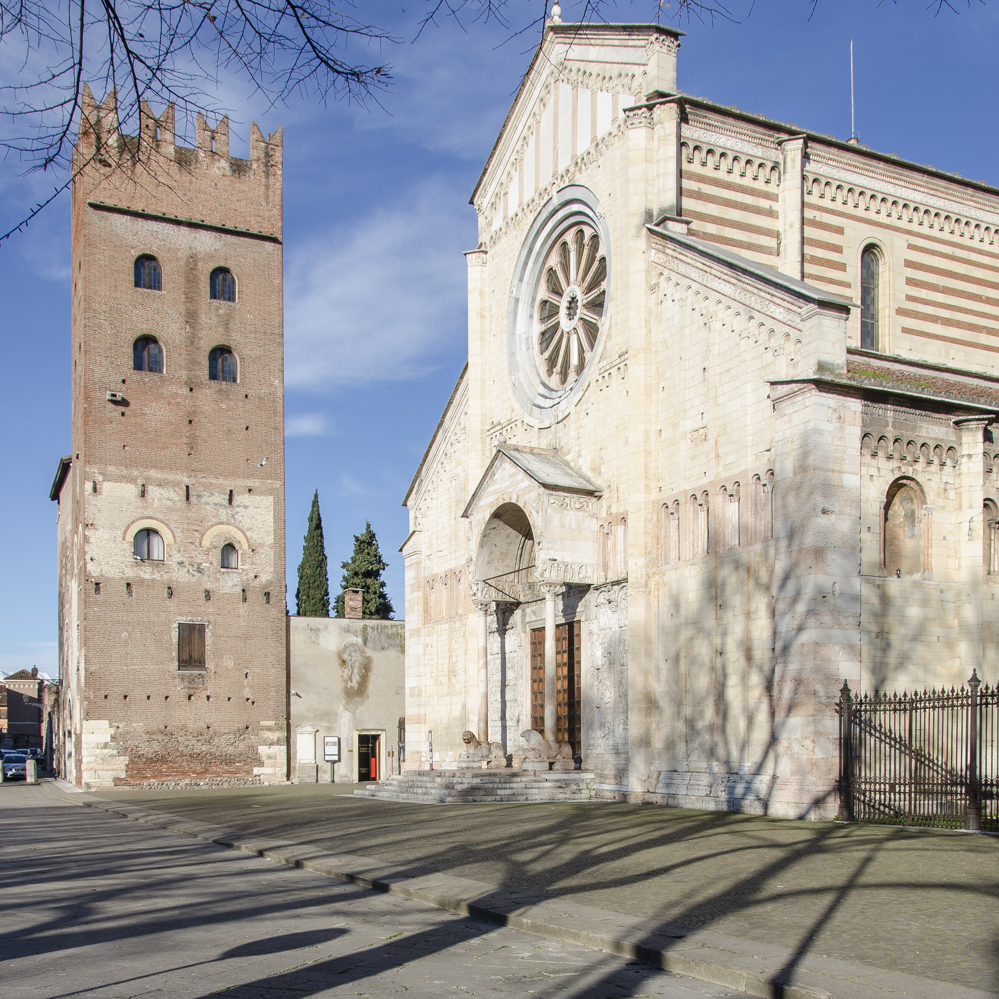 Vista da piazza San Zeno